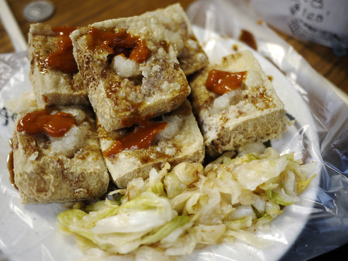 中文（台灣）: 酥炸臭豆腐